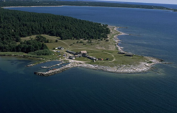 Motiv: Grynge fiskeläge Nyckelord: Flygbilder, Riksintressen Kategori: Fiskeläge Grynge fiskeläge